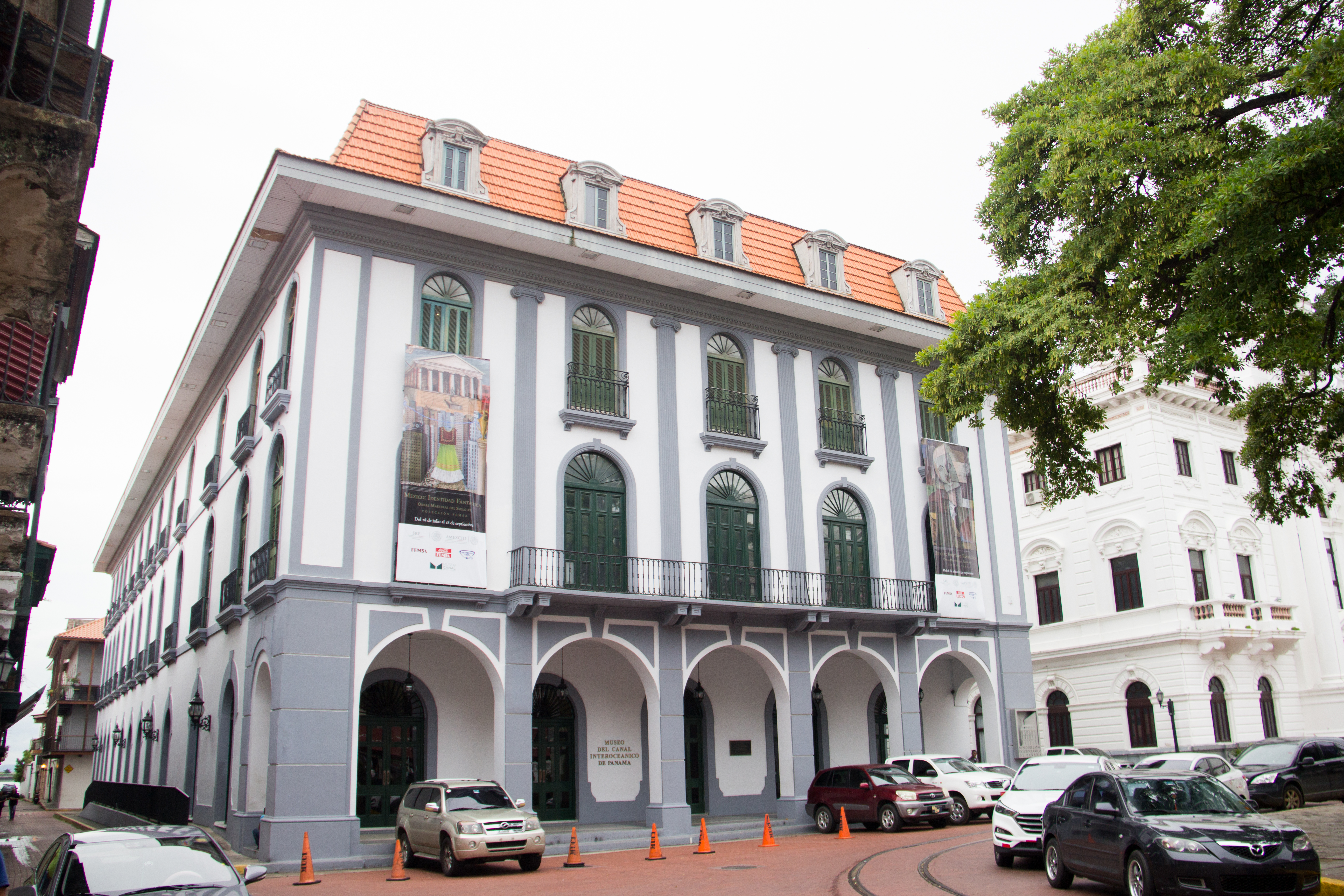 El edificio que alberga el Museo del Canal Interoceánico de Panamá fue construido en 1874, como el Grand Hôtel por el alsaciano George Loew. Fue comprado posteriormente, por el Conde Ferdinand de Lesseps para instalar las oficinas de la Compañía Universal del Canal Interoceánico; funcionó aquí la Nueva Compañía del Canal y luego se vendió a Estados Unidos junto a la concesión para la construcción del Canal de Panamá. En 1915, fue comprado por el Dr. Belisario Porras, Presidente de Panamá, y se instalaron oficinas ministeriales. Fue la sede de los Correos y Telégrafos y en la entrada del edificio se aprecia los mosaicos con este nombre. En 1996, el Patronato del Museo del Canal rehabilitó el edificio para inaugurar el Museo del Canal Interoceánico de Panamá en 1997.